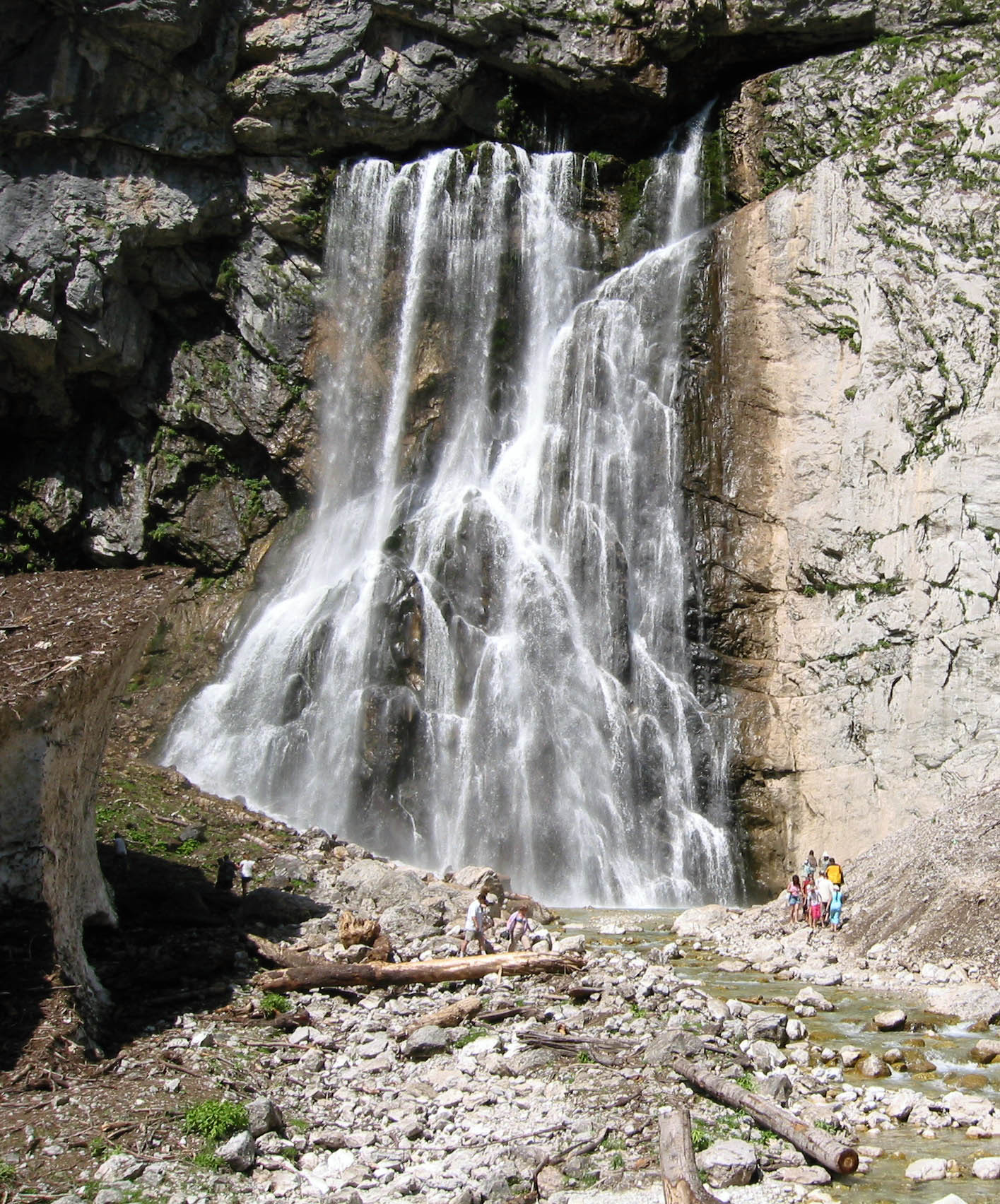 Gegsky waterfall